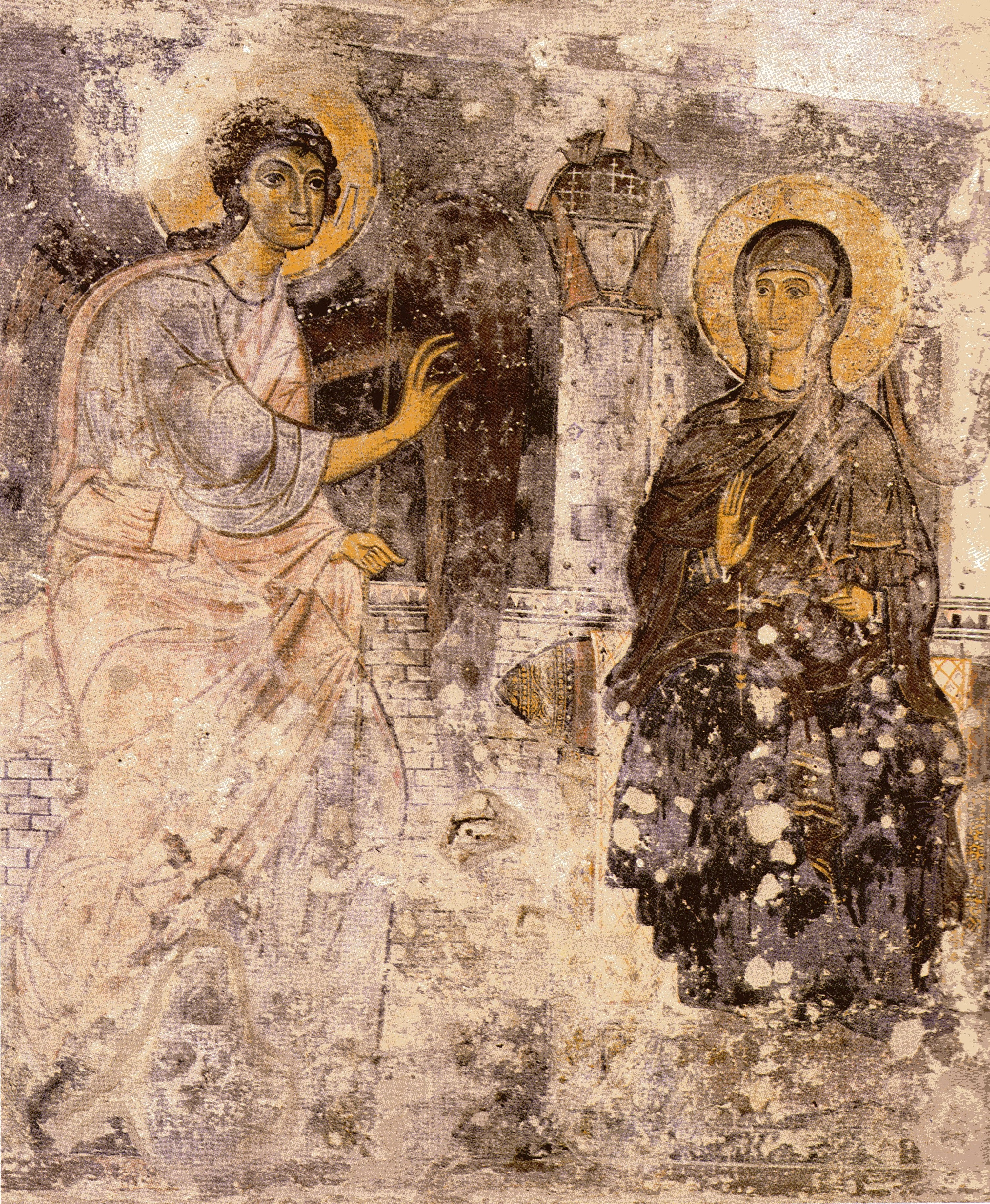 Ευαγγελισμός στην Πρωτόθρονο Χαλκείου Νάξου